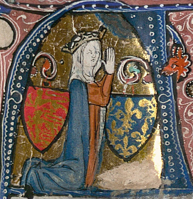 Psautier de la reine Isabelle d'Angleterre : lettrine avec la reine en prière, entourée des armes de France et d'Angleterre.